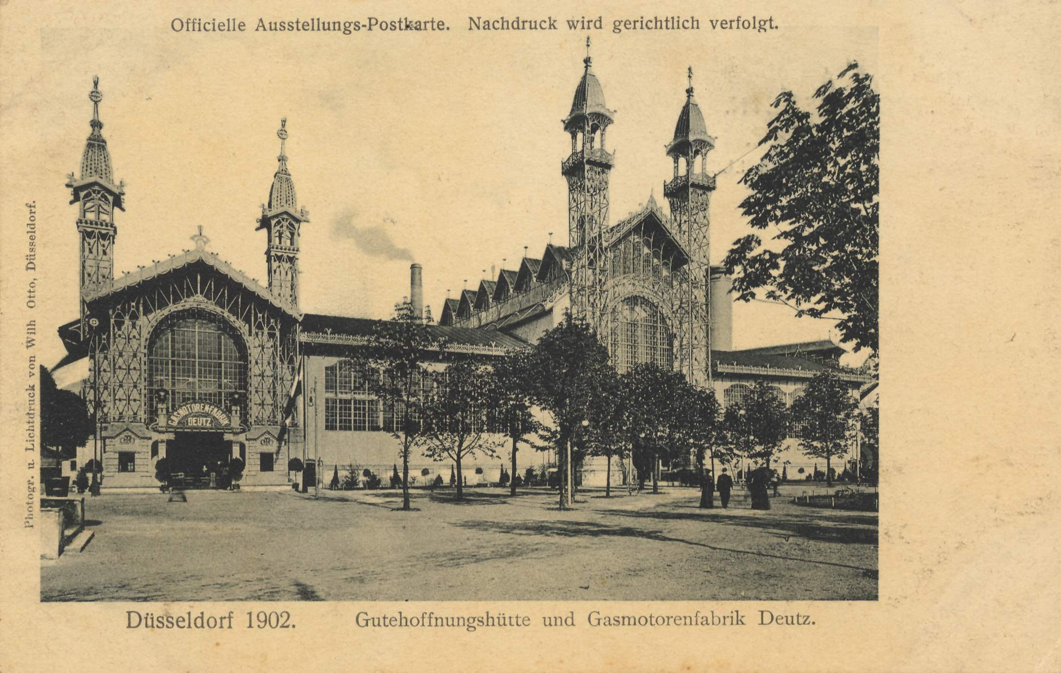 Gewerbe- und Industrie-Ausstellung 1902, Gutehoffnungshütte und Gasmotorenfabrik Deutz